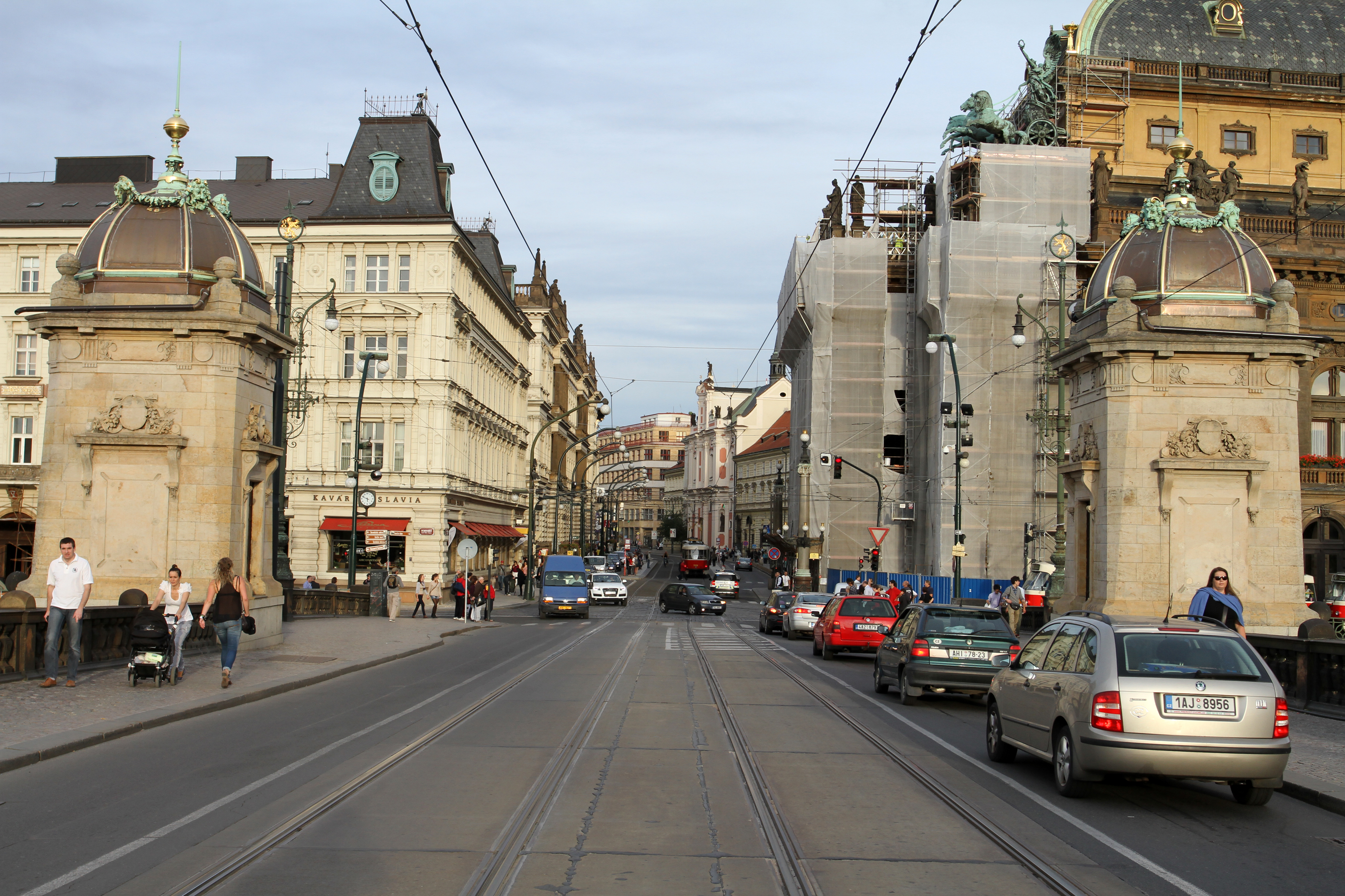 Silniční most Legií (Staré Město), Praha 1, mezi Národní a Vítěznou, Staré Město - Malá Strana, Staré Město